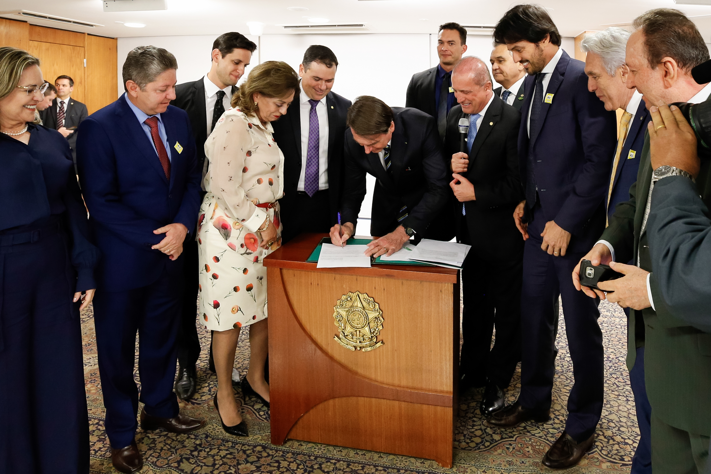 (Brasília - DF, 04/06/2019) Presidente da República, Jair Bolsonaro durante Ato de assinatura da regulamentação das atividades em Salinas. Foto: Isac Nóbrega/PR